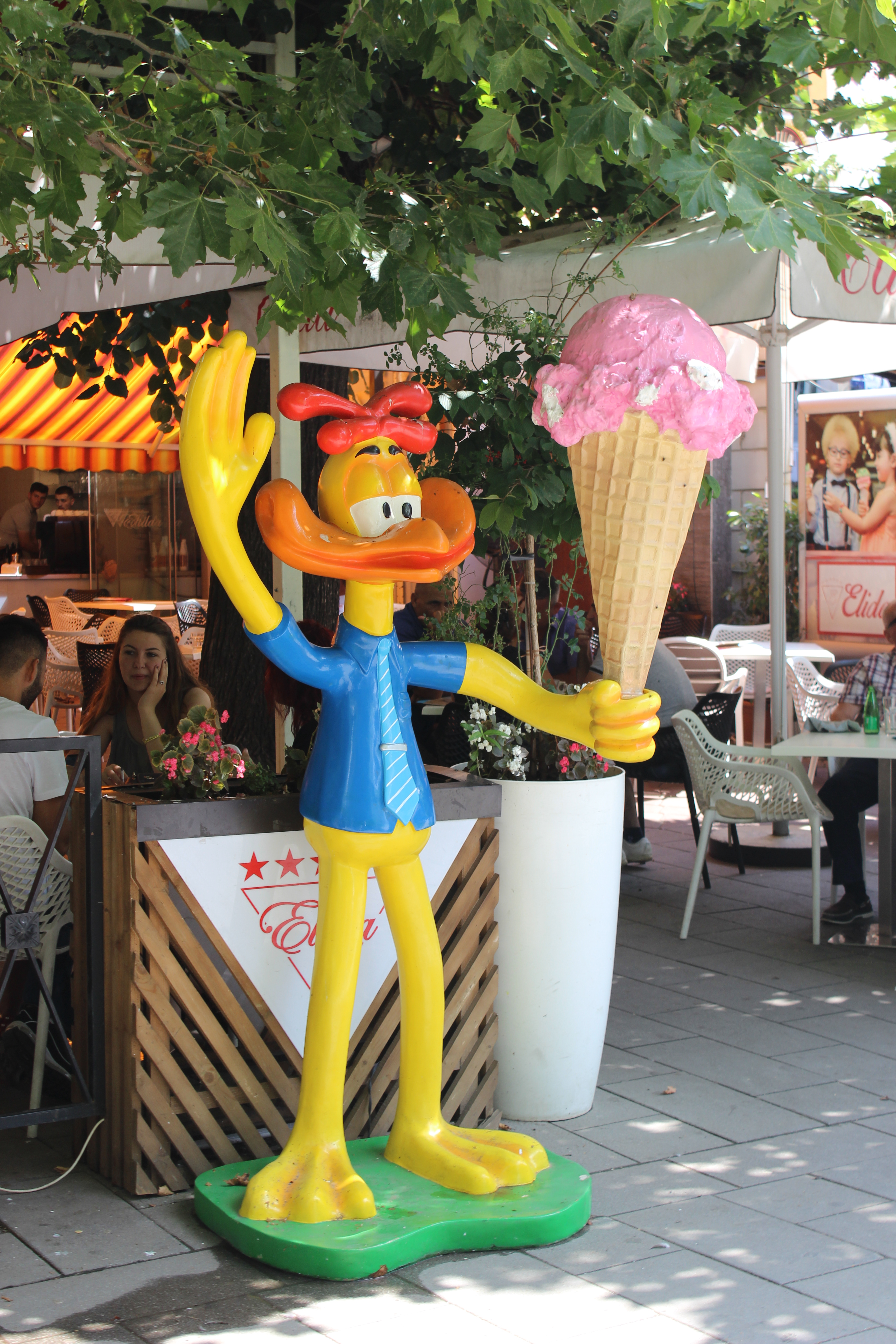 Embeltorja Elida, Ferizaj